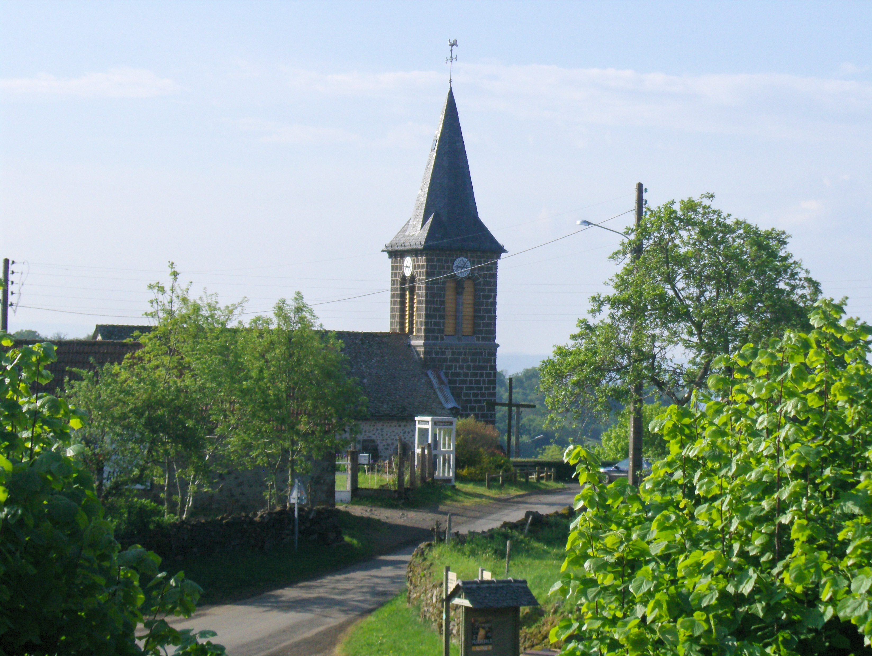 Gîte de Groupe qui peut accueillir 41 couchages